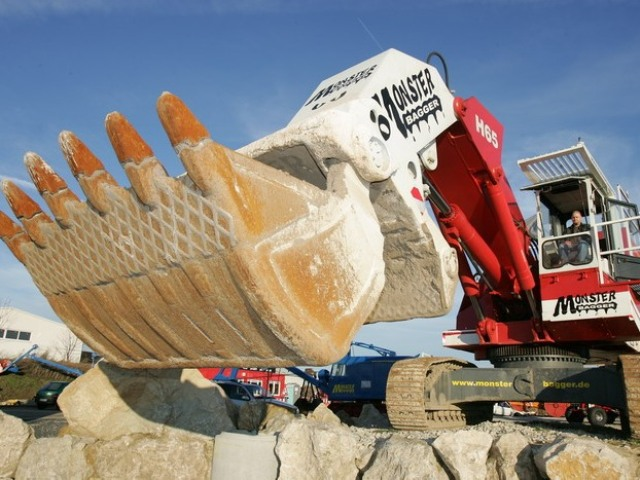 Dieses Bild des Monsterbaggers DEMAG H65 wurde im Jahr 2008 im Monsterpark Rattelsdorf aufgenommen.